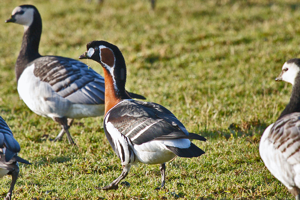 Weißwangengänse und Rothalsgans, seltener Wintergast im NSG Bislicher Insel, NRW, Deutschland